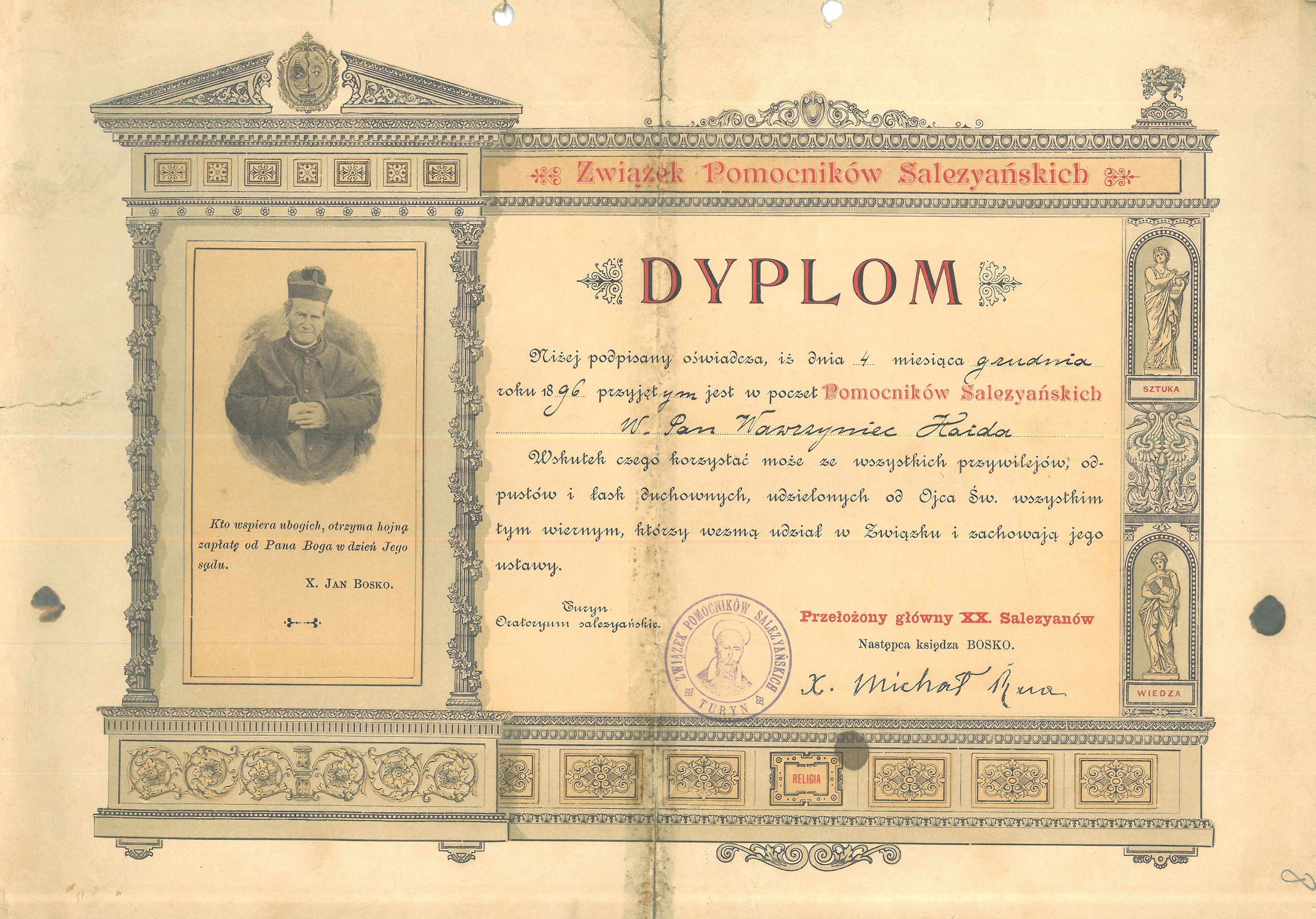 Dokument ze zbiorów Izby Regionalnej w Piekarach Śląskich